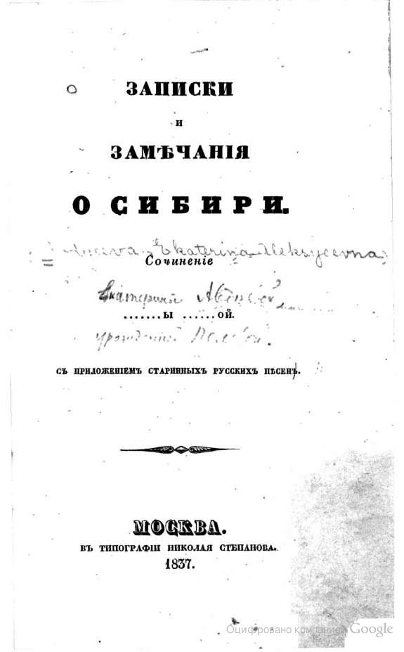 Обложка книги Е. А. Полевой «Записки и замечания о Сибири».